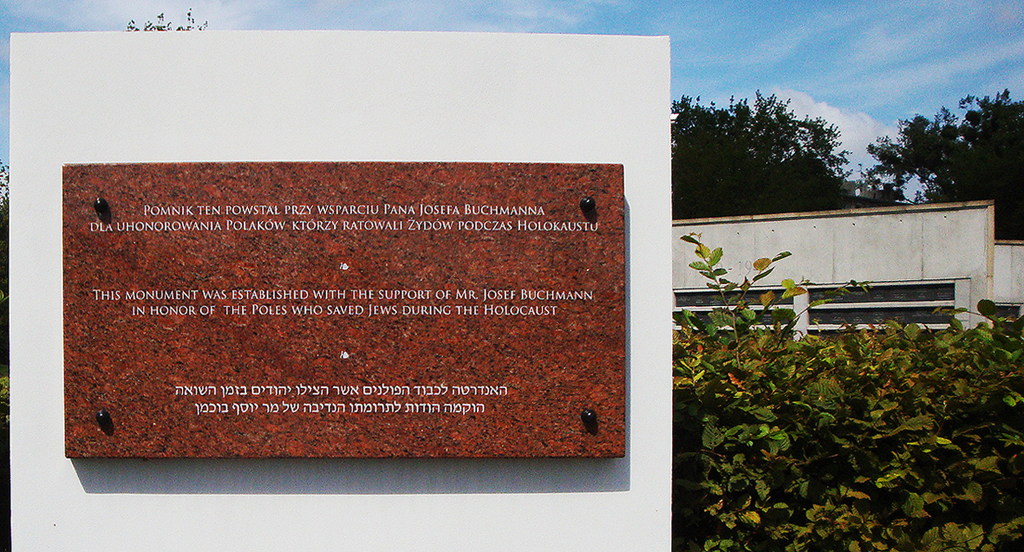 Tablica donacyjna Pomnika Sprawiedliwych w Łodzi Josefa Buchmanna w Parku Ocalałych stan z 2014 r.